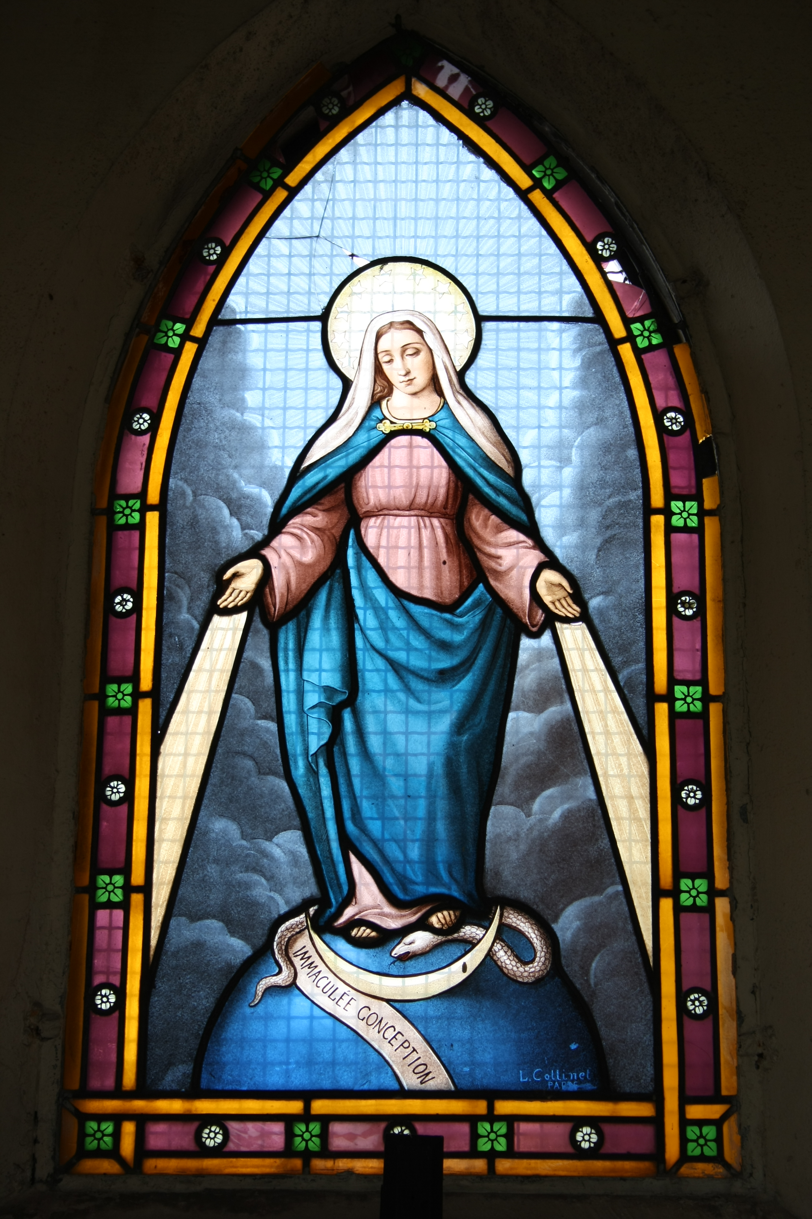 Bleiglasfenster auf dem Friedhof Père Lachaise in Paris, Darstellung: Maria; Inschrift: "L. Collinet Paris"